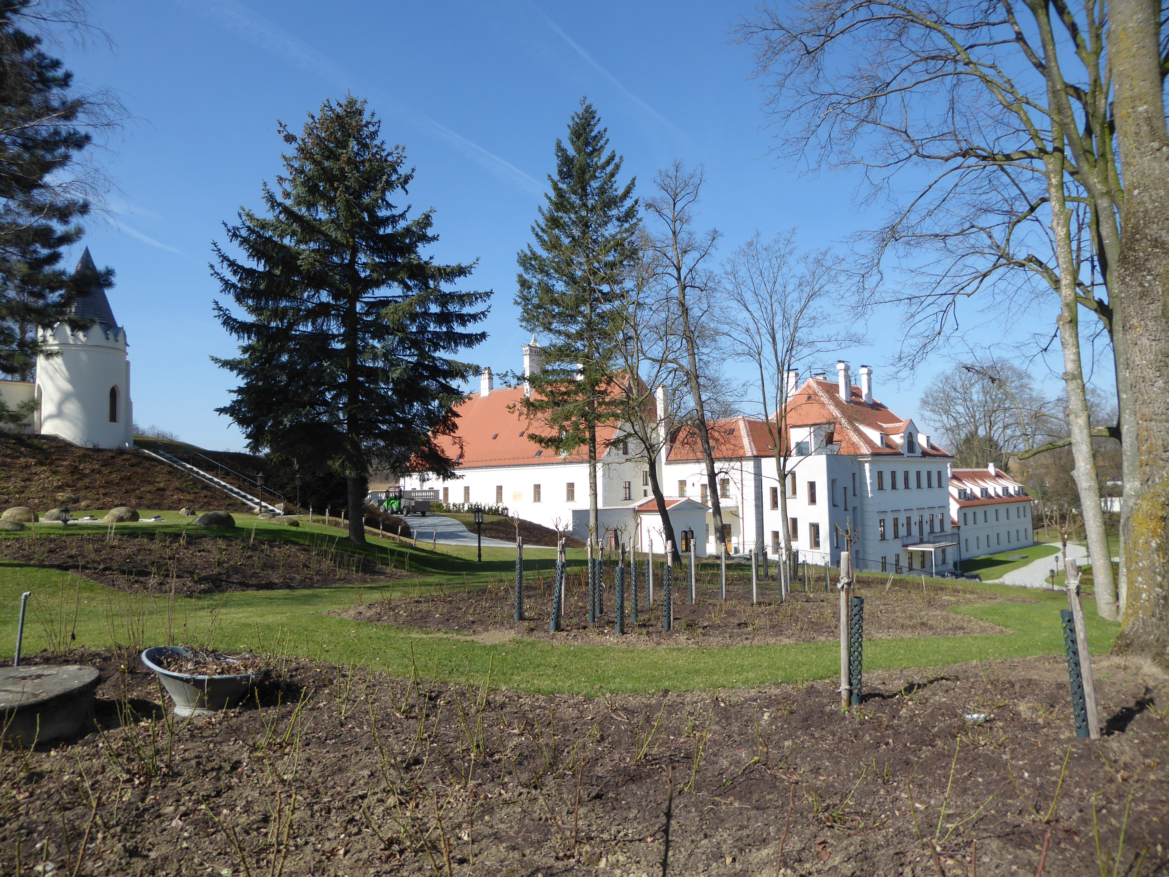 Schloss Thalheim, Thalheim 22, Kapelln, Niederösterreich - Süd- und Ostflügel; am linken Bildrand Rundpavillon